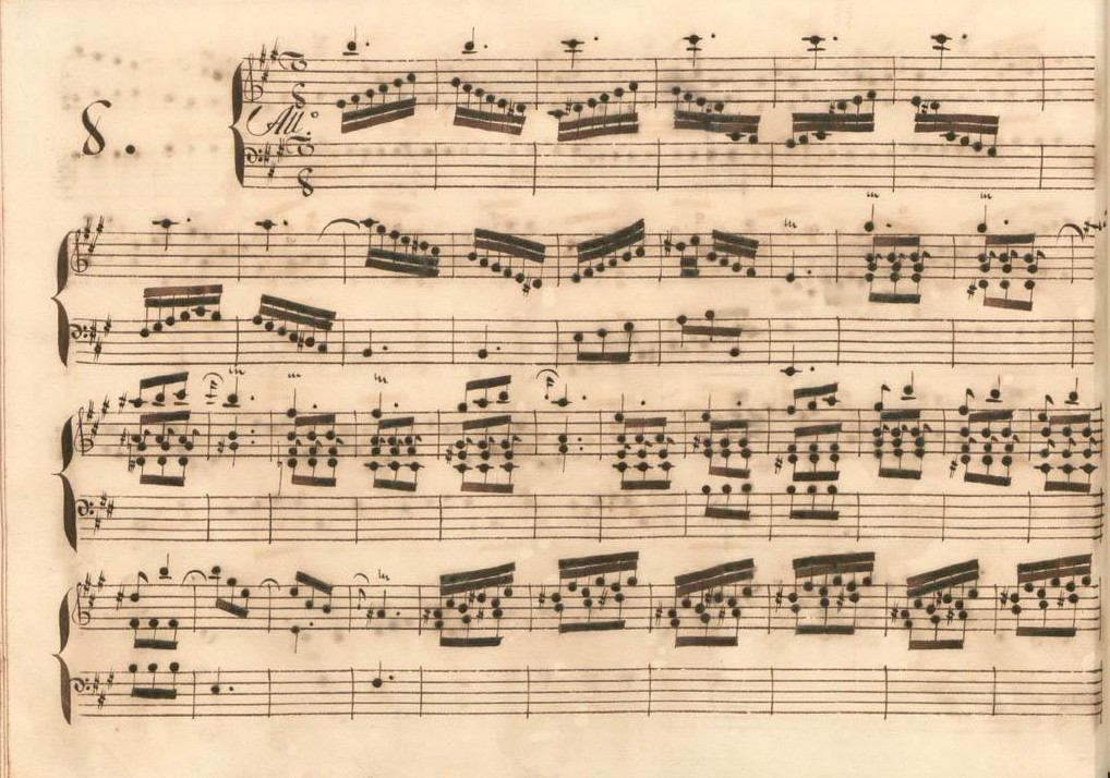 La sonate K. 395, telle qu'elle se présente dans le manuscrit de Parme, volume XI no. 8.